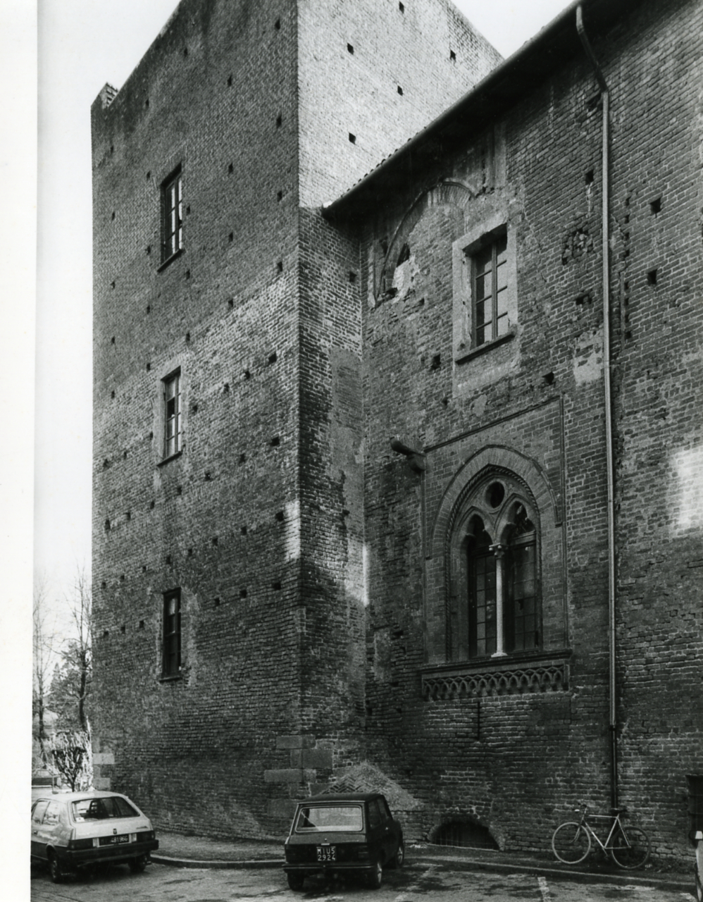 Abbiategrasso. Castello Visconteo. Vista scorciata su un lato con torre angolare e particolare con monofora. Servizio fotografico : Abbiategrasso, 1980 / Paolo Monti. - Stampe: 2 : Positivo b/n, gelatina bromuro d'argento/ carta, 18x24, 24x30. - ((Al verso delle stampe manoscritti i numeri dei negativi corrispondenti (formato 35 mm) con indicazione del fotogramma: 3565/25, 3565/29. - Timbro a inchiostro con copyright: "© Copyright/ Credit to/ Paolo Monti/ Corso Sempione [...]/ Milano". - Sul coperchio della scatola iscrizione didascalica manoscritta a pennarello nero: "Architettura/ Castelli". - Occasione: Documentazione per la pubblicazione: Vincenti Antonello, "Castelli viscontei e sforzeschi", Milano, Rusconi immagini, 1981. - Fonte: Agenda di Paolo Monti: Nikon Leika 3001-/ Monti 1978 (1978-1982), presso Archivio Paolo Monti. - Fonte: Monografia di Vincenti, Antonello: Castelli viscontei e sforzeschi, Milano, Rusconi immagini (1981)